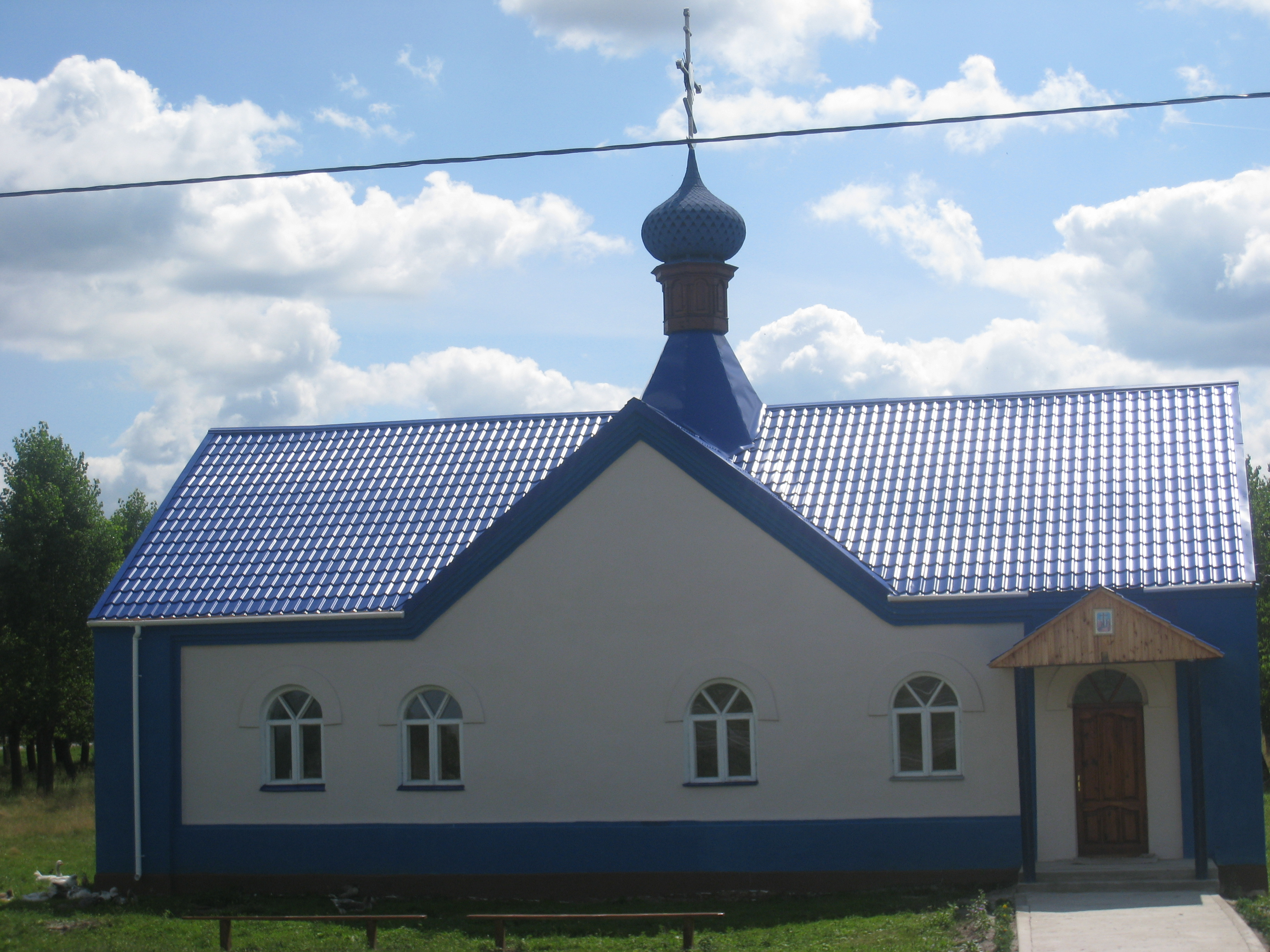 Верасьніца (Жыткавіцкі раён). Царква, былая лазьня.